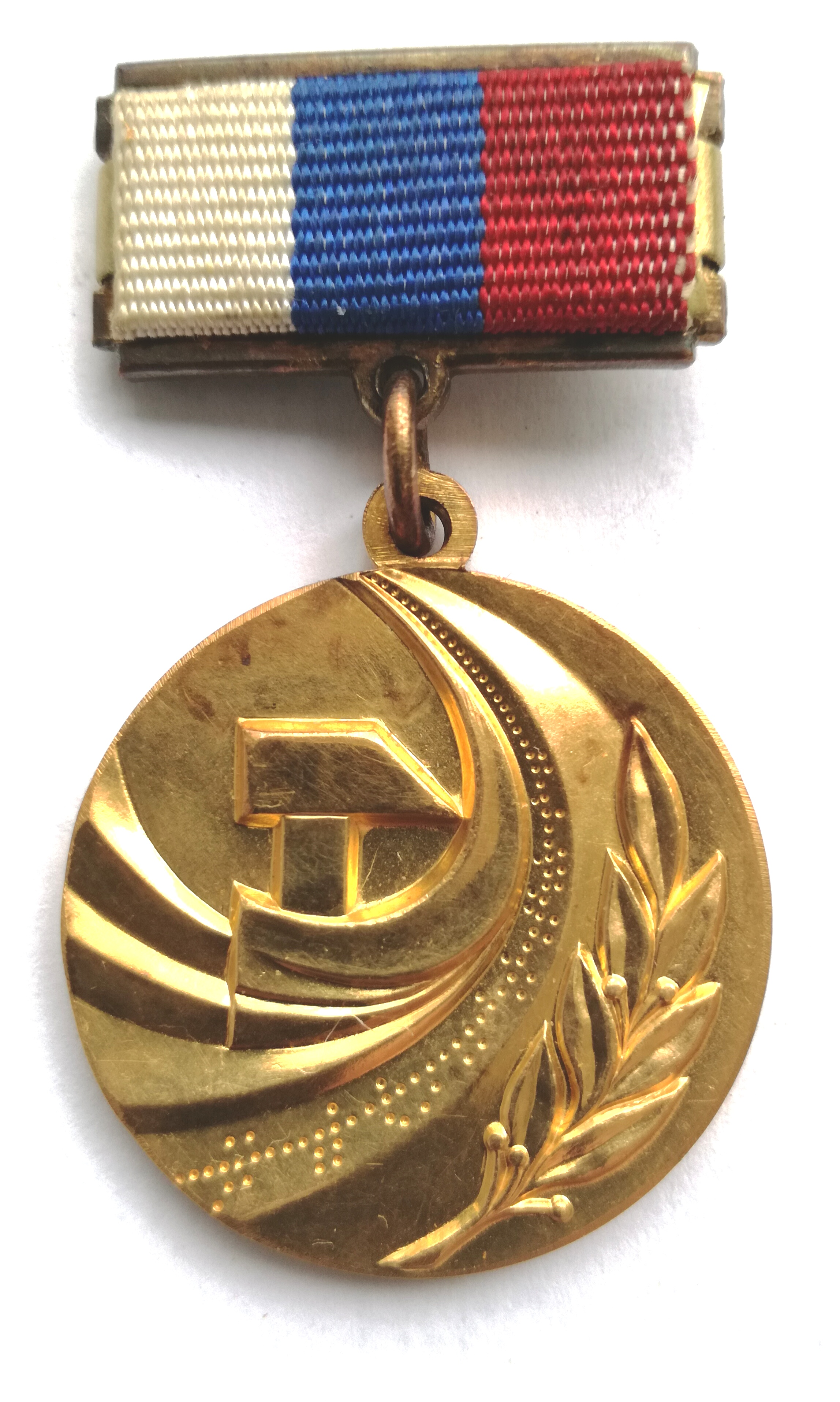 Знак лауреата Госпремии РФ в области науки и техники